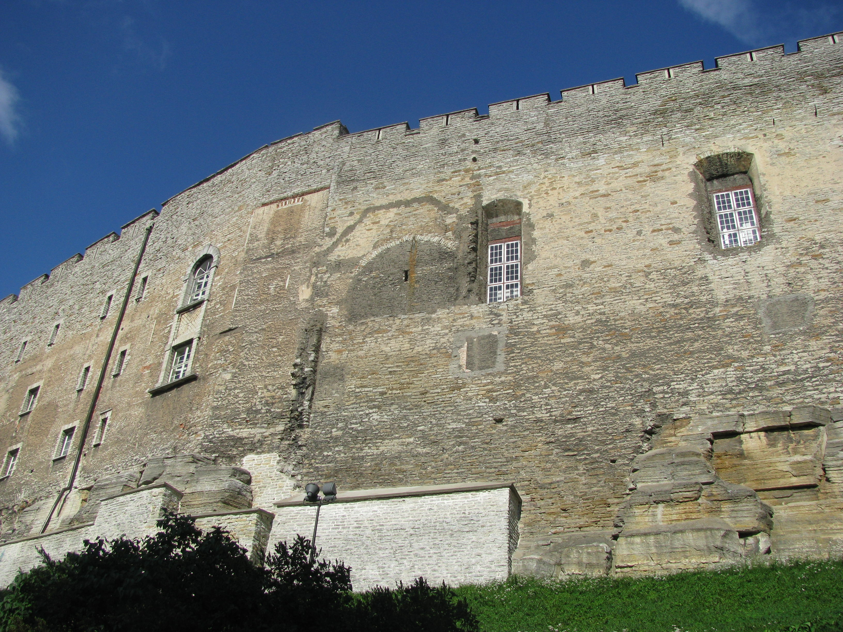 Toompea lossi müür Toompuiestee poolses küljes. Müüris võib näha eri aegade ümberehitusi, samuti on all paremal nähtaval kindlusealune paelade.